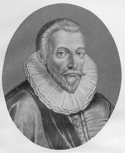 Jan Gruter Jan Gruter